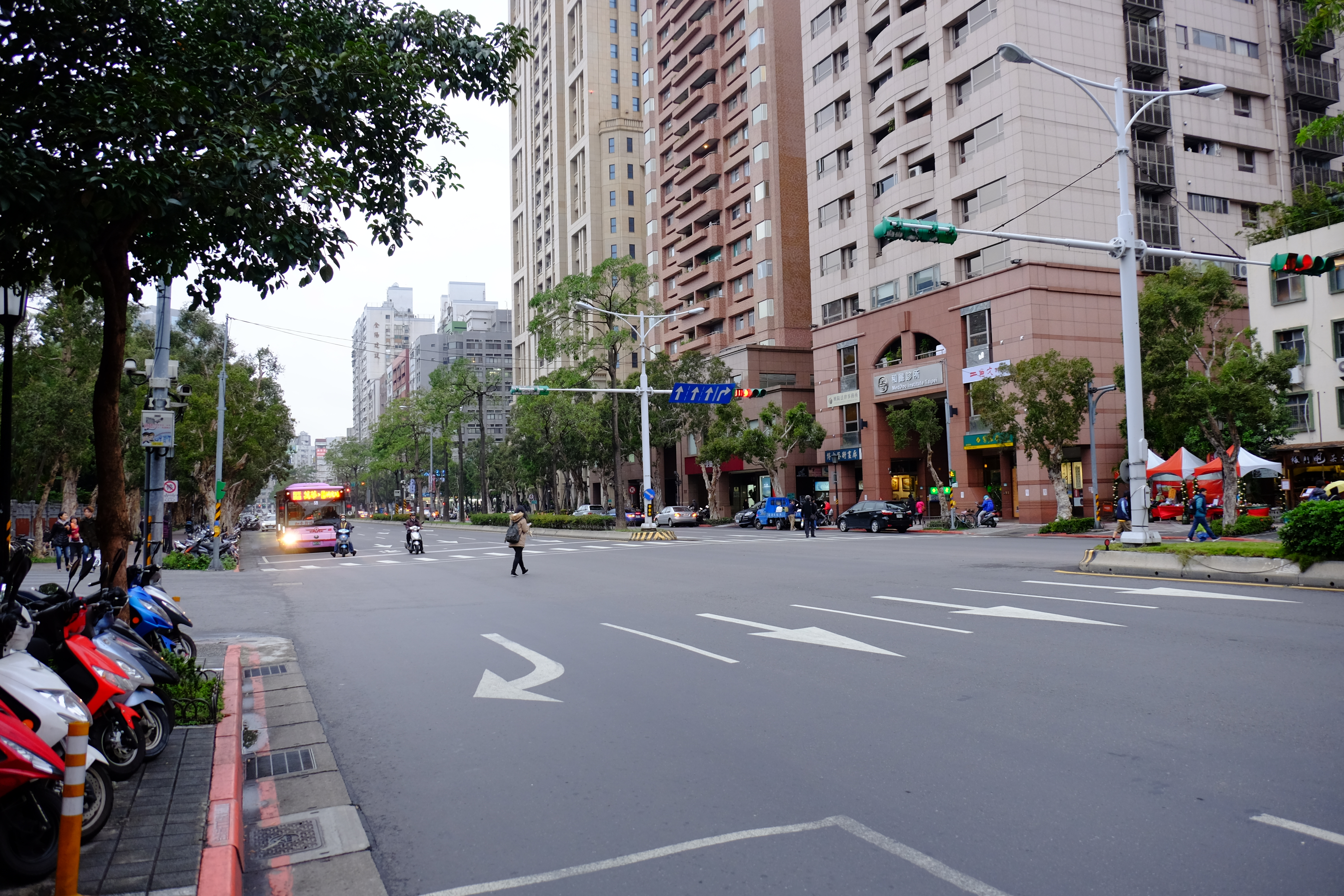 從臺灣師範大學臺北校區正門前東望臺北市大安區和平東路一段。